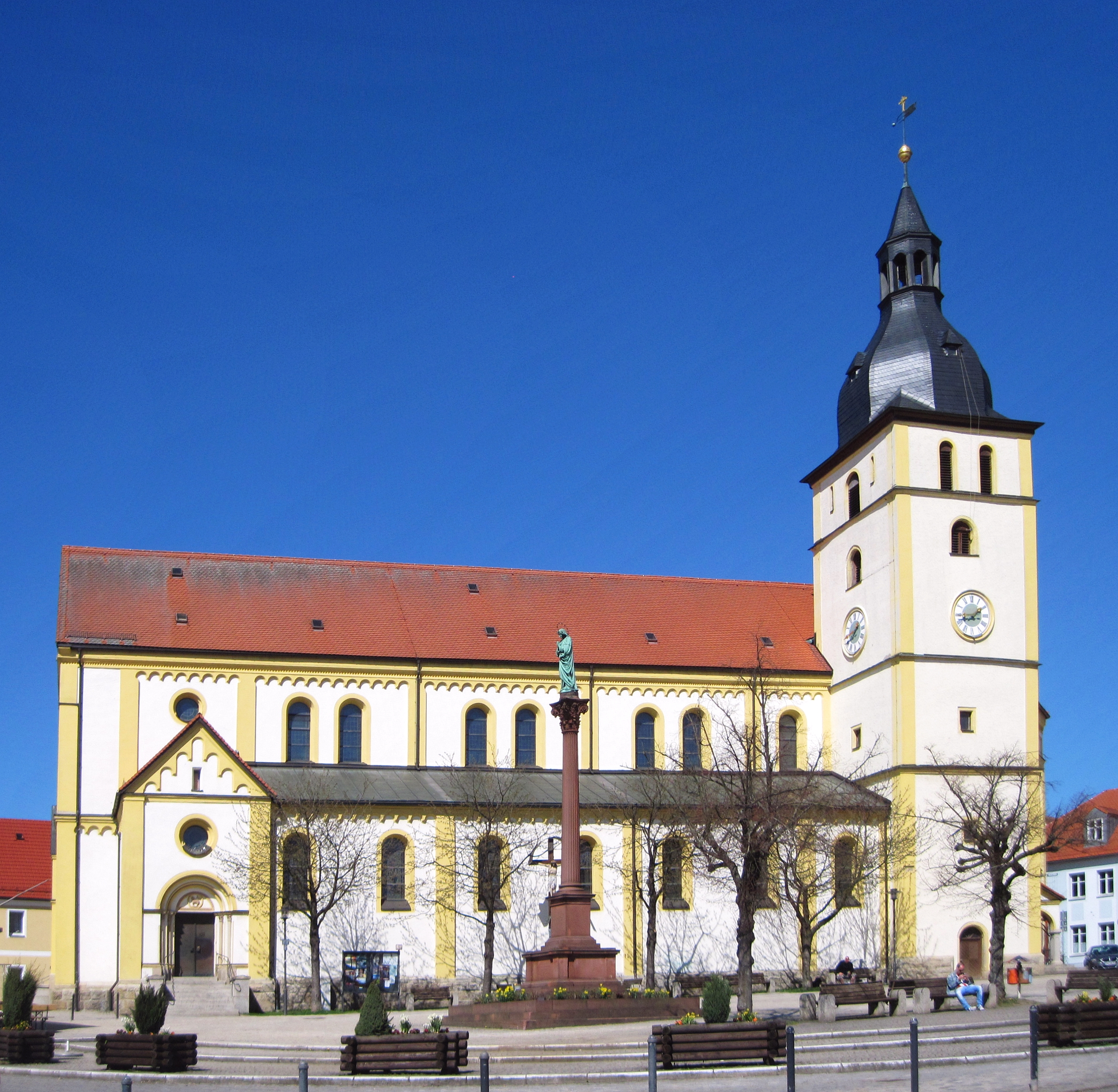 Römisch-katholische Pfarrkirche St. Jakob von 1896 - der Turm von 1606 ist Wahrzeichen von Mitterteich, Oberpfalz Bayern - Foto Wolfgang Pehlemann IMG_1077